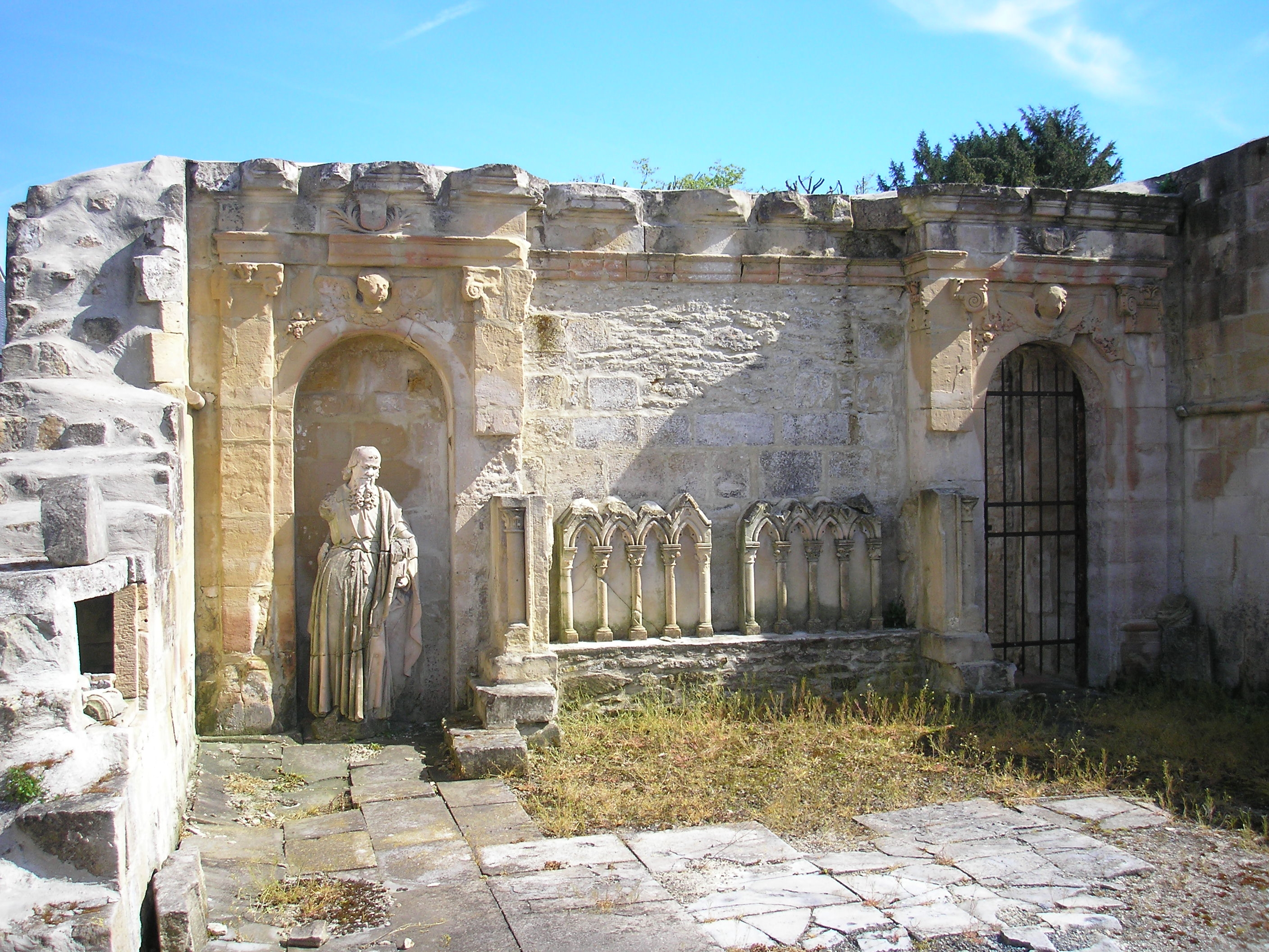 Bréville-les-Monts (Normandie, France). Vestiges de l'ancienne église Saint-Pierre (ISMH, 16/05/1927).